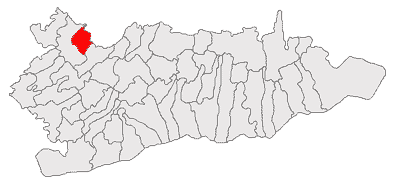 Categorie:Hărţi ale judeţului Călăraşi